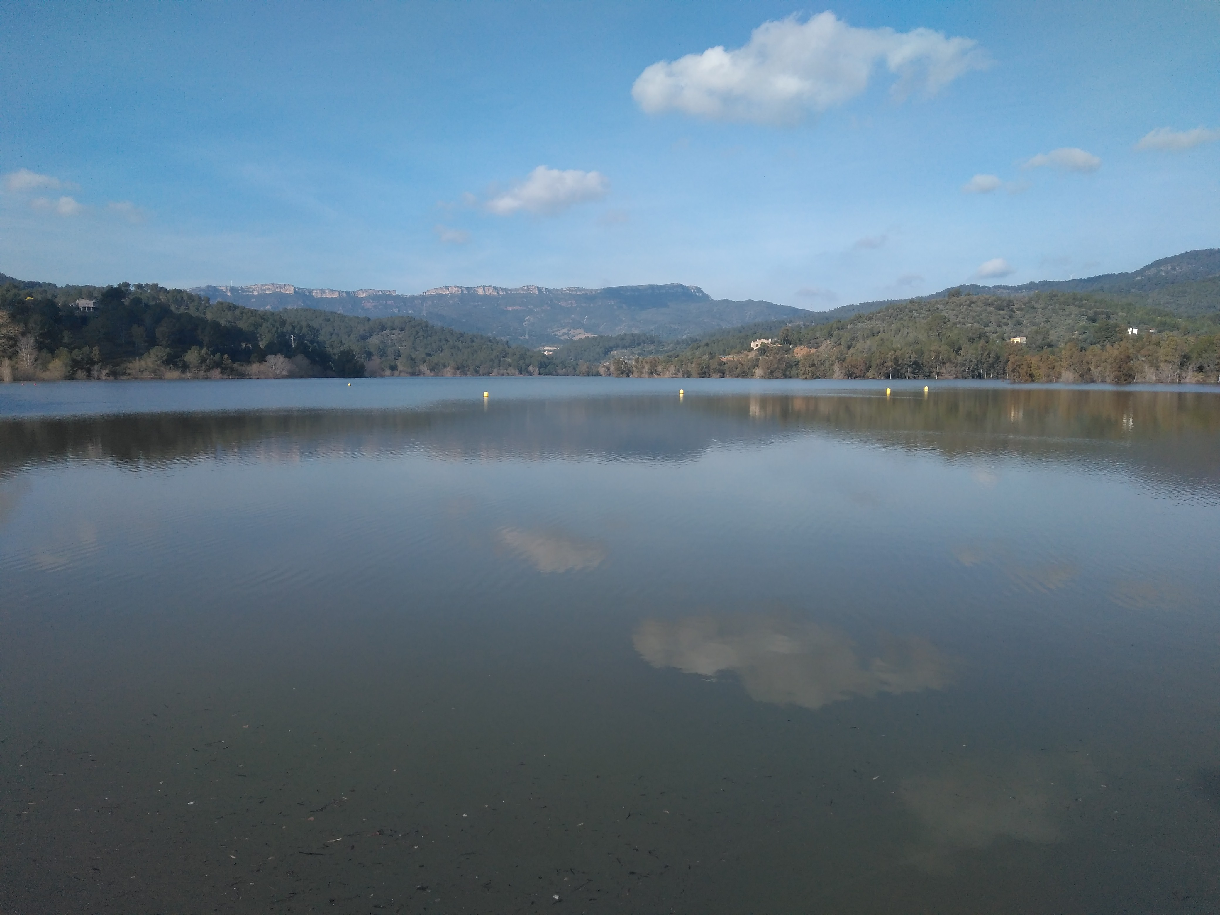 Embassament de Riudecanyes ple després del pas del Temporal Glòria